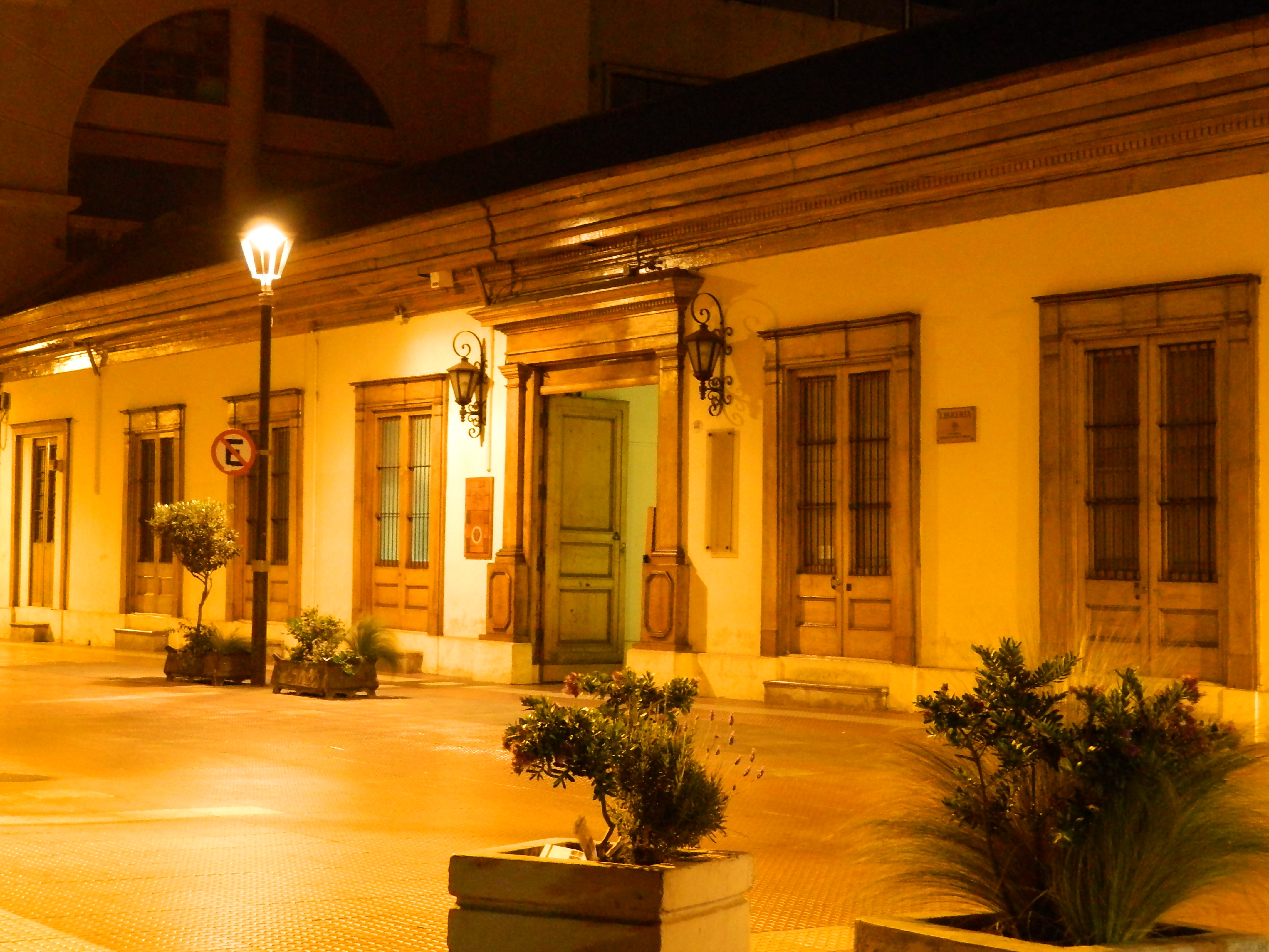 Casa Piñera This is a photo of a national monument in Chile: 1367